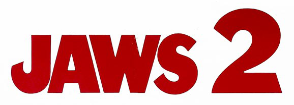 Logo von Der weiße Hai 2